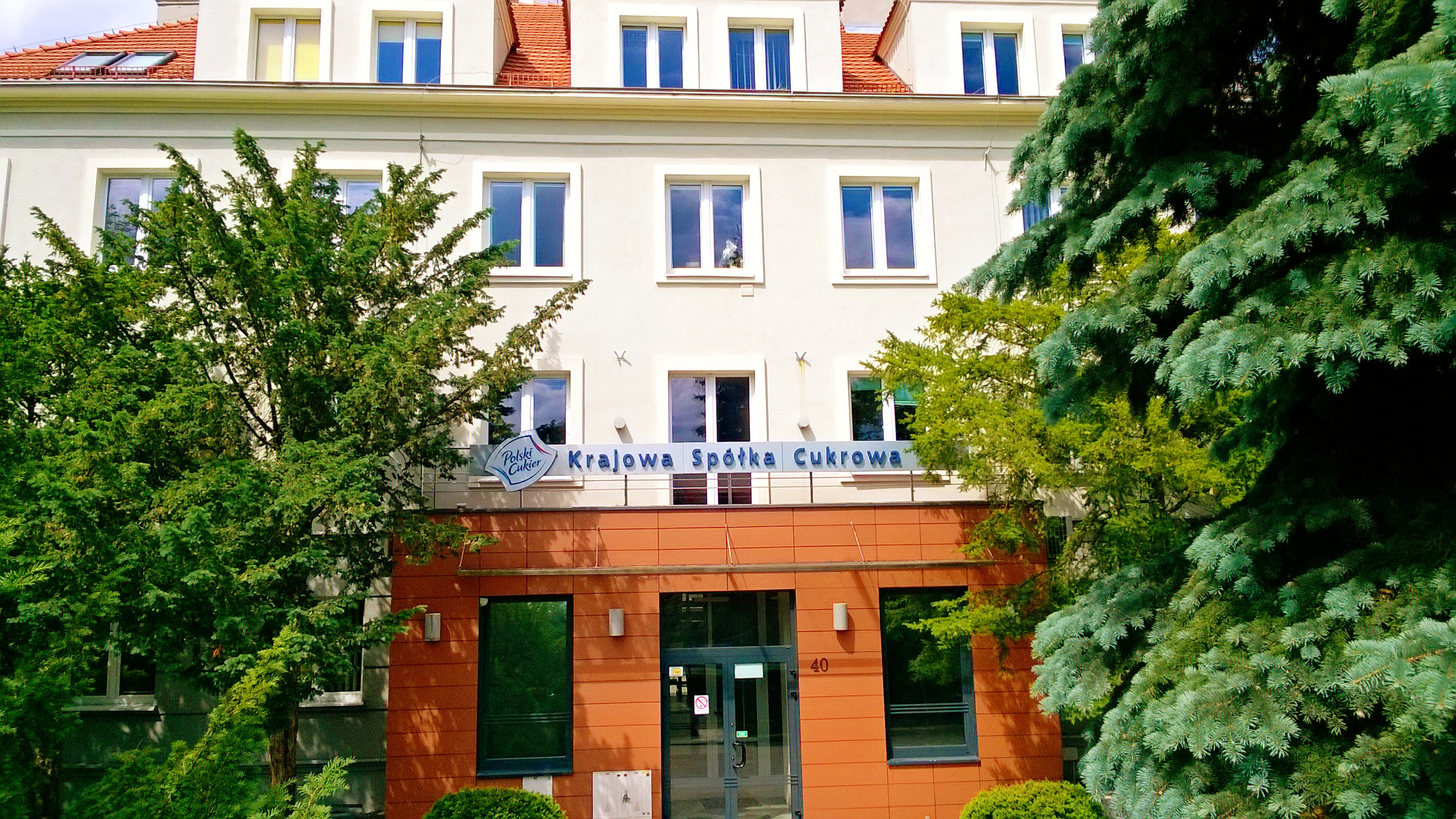 Siedziba Krajowej Spółki Cukrowej w Toruniu22